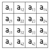 Рисунок 2 – матрица 4х4.